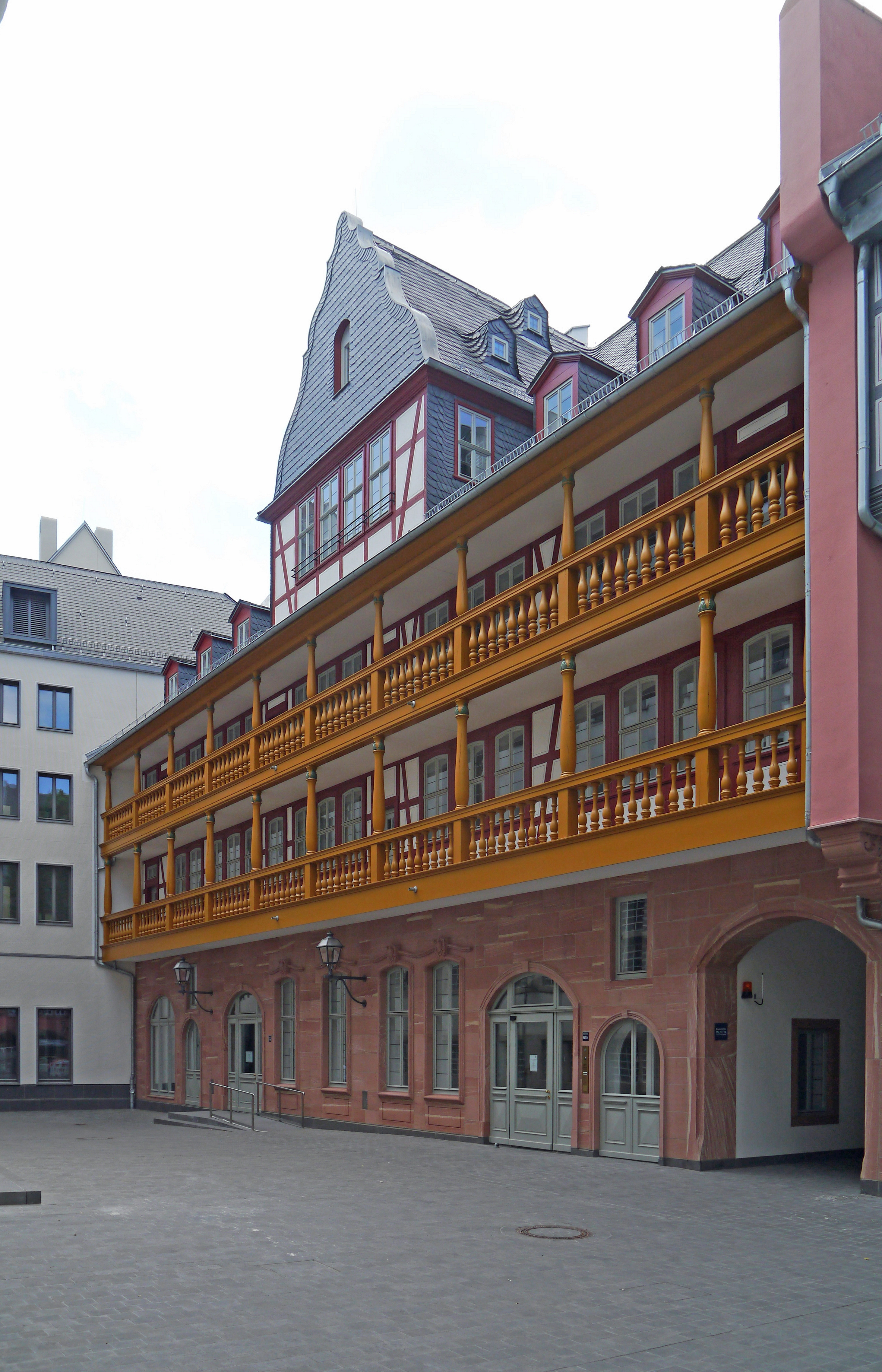 Das Haus Hof zum Rebstock, Ansicht Ostseite. Dom-Römer-Projekt in der Frankfurter Altstadt im Juni 2018.